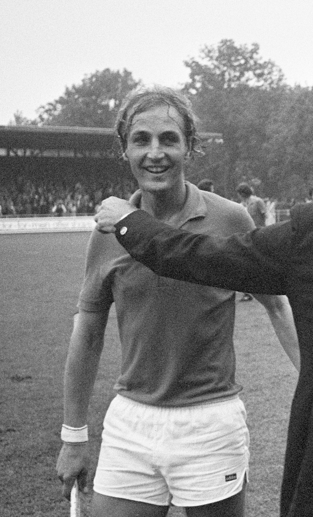 Wereldbeker Hockey te Amstelveen, spelmoment Nederland tegen Engeland 2-1, spelers verlaten het veld, links Jeroen Zweerts